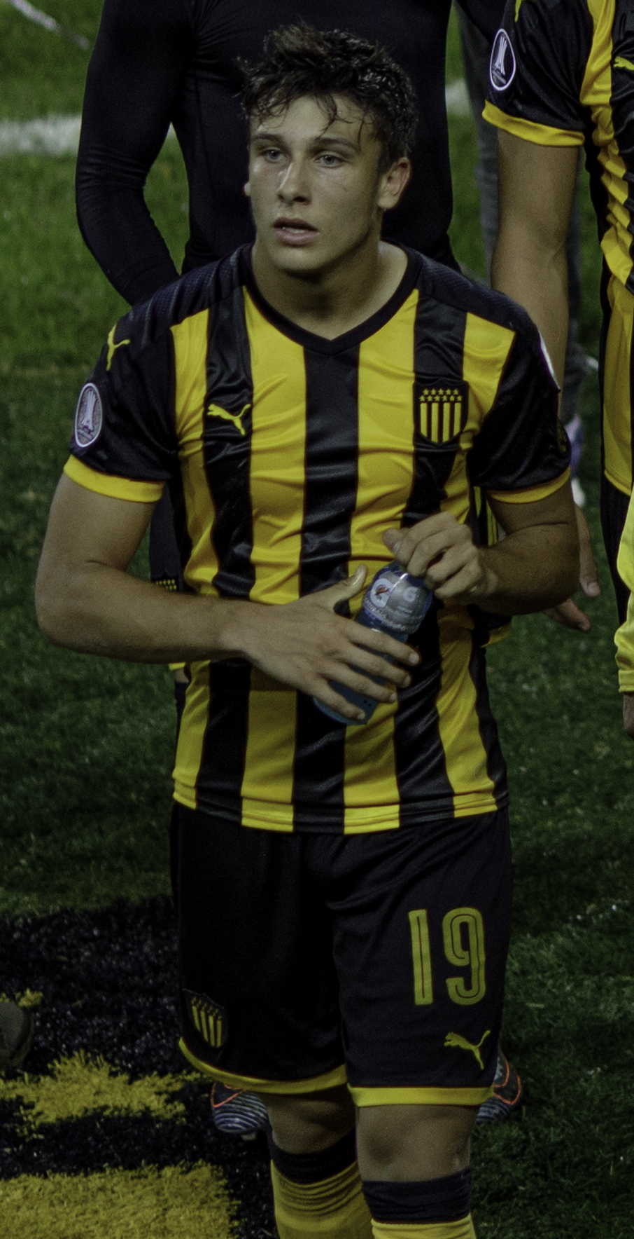 12 KEVIN DAWSON 6 GUILLERMO VARELA 2 FABRICIO FORMILIANO 21 RAMÓN ARIAS 22 RODRIGO ROJO 13 FABIÁN ESTOYANOFF 14 GUZMÁN PEREIRA 7 CRISTIAN RODRÍGUEZ 19 AGUSTÍN CANOBBIO 11 MAXIMILIANO RODRÍGUEZ 26 GABRIEL FERNÁNDEZ DT LEONARDO RAMOS Atlético Tucumán: 24 AUGUSTO BATALLA 20CRISTIAN VILLAGRA 2 RAFAEL GARCÍA 14 MAURO OSORES 25 GABRIEL RISSO PATRÓN 8 GUILLERMO ACOSTA 23 NERY LEYES 29 RODRIGO ALIENDRO 10 GERVASIO NÚÑEZ 12 JAVIER TOLEDO 7 LUIS RODRÍGUEZ DT RICARDO ZIELINSKI Camera: Canon EOS 5D Mark IV 0 ISO: 800